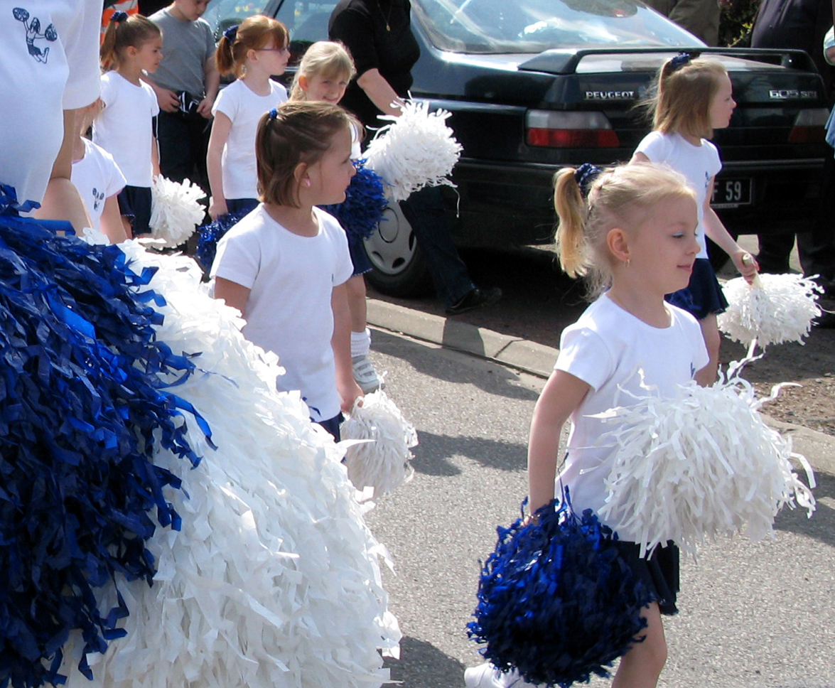 Nieppe (Nord, France) - Animation festive au centre-ville, un dimanche de printemps. Immédiatement après le rond-point de la rue d'Armentières, la parade emprunte vers 15 h 30 la rue Basse-Ham (se dirigeant vers le Nord). Après le passage de Miss Nieppe et ses 2 dauphines (à bord d'une voiture de collection) en tête de cortège, le géant Miss Cantine est suivi par La Cantinière et par les musiciens de la troupe des Zwinuzabs. Viennent ensuite les Pom-pom girls nieppoises. .